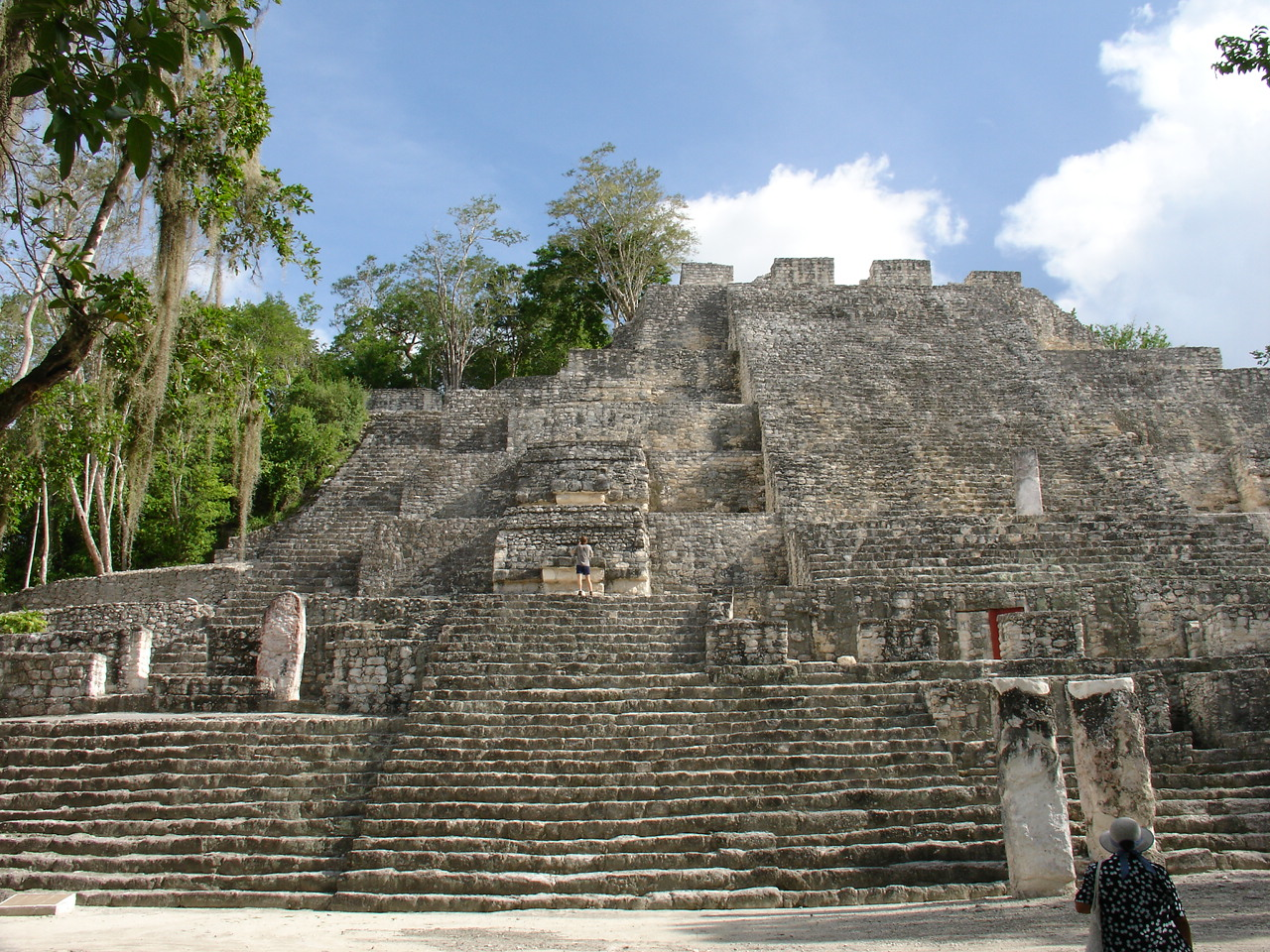 Zona arqueológica de Calakmul.